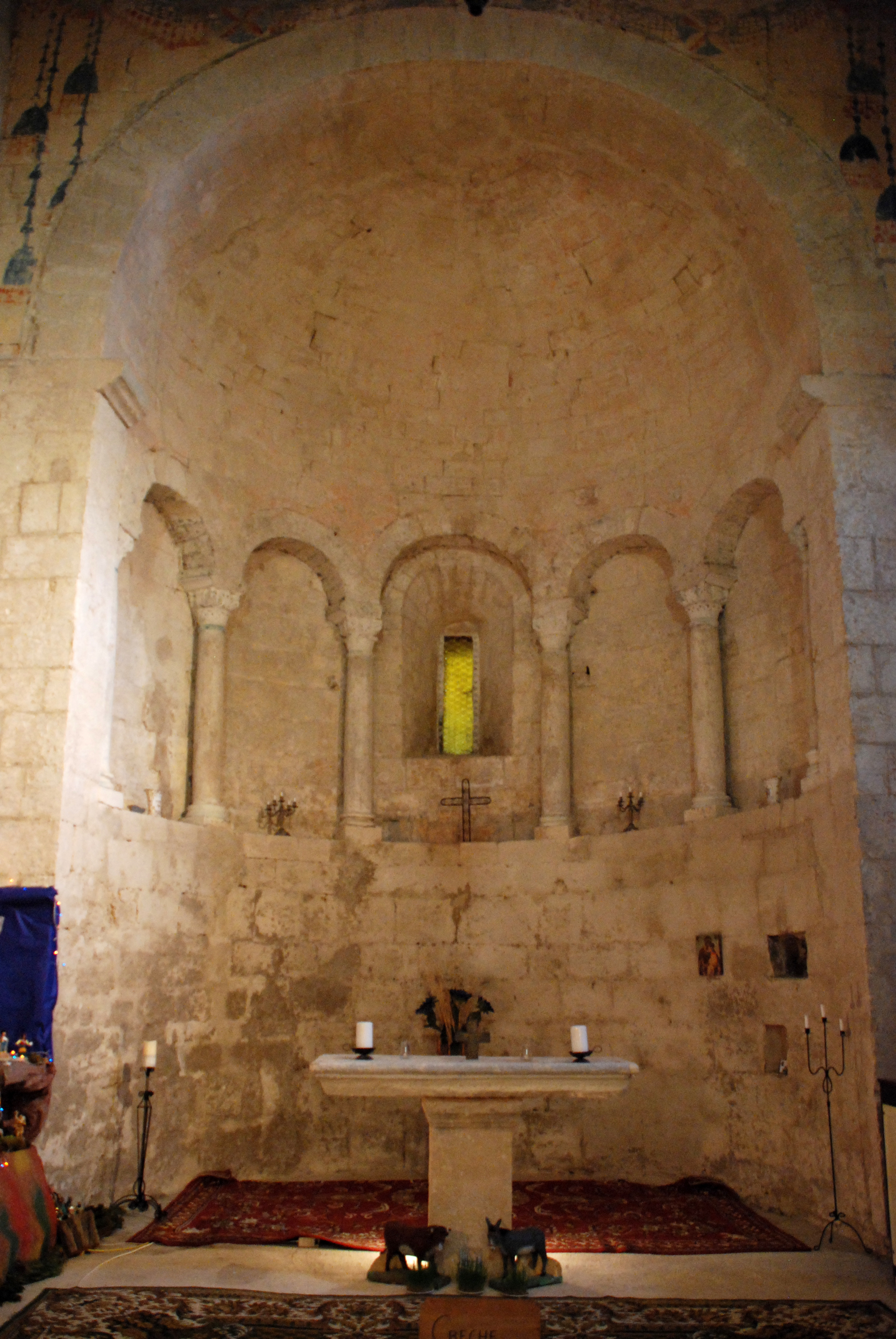 France - Provence - Alpes-de-Haute-Provence - Église de Saint-Martin-les-Eaux